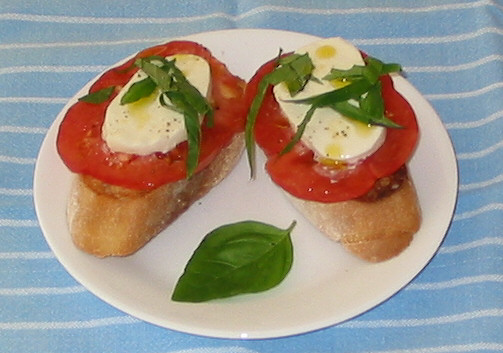 Fresh Mozzarella Bread